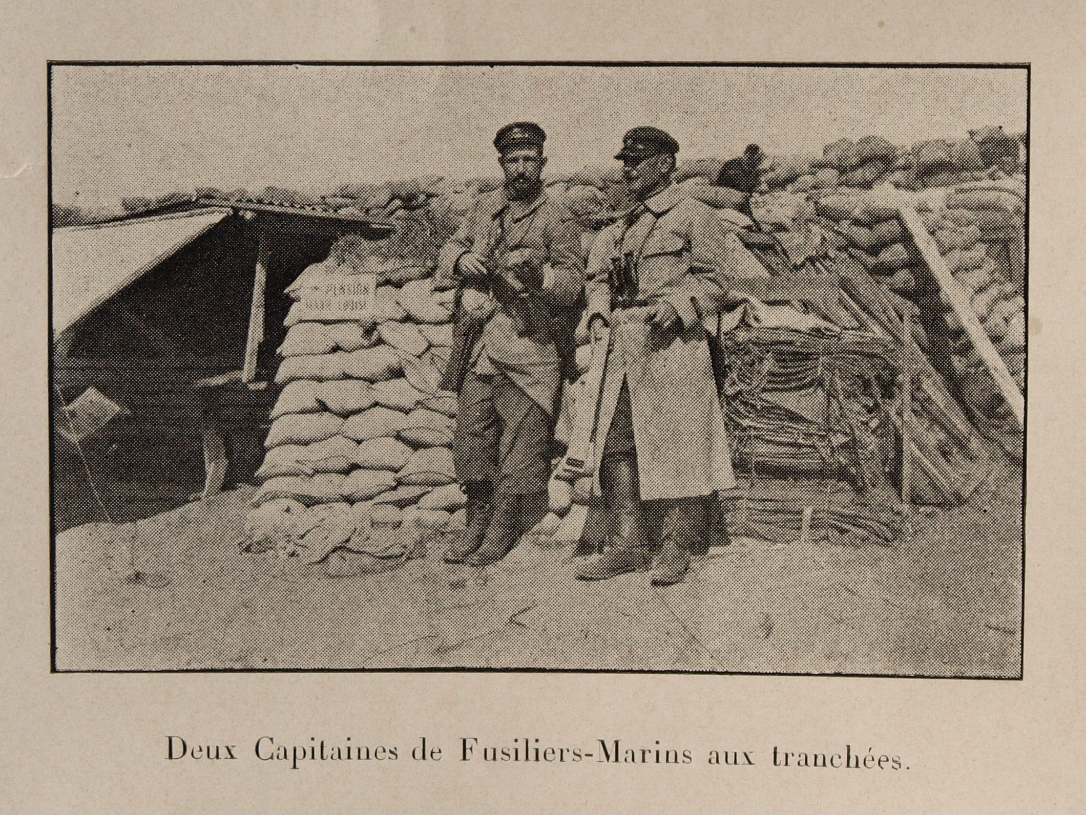 Nieuport durant les combats de la première guerre mondiale